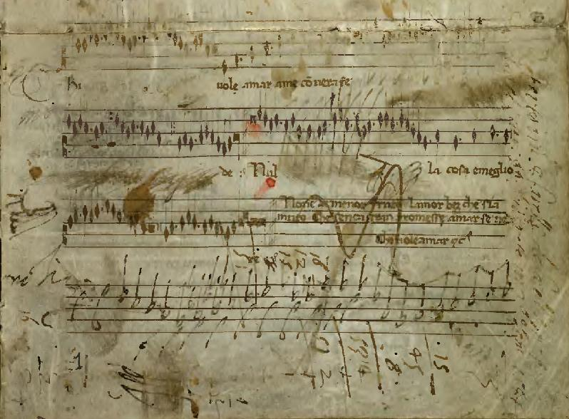 Codex Mancini